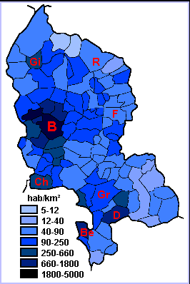 Carte de la densité de population du Territoire de Belfort. .